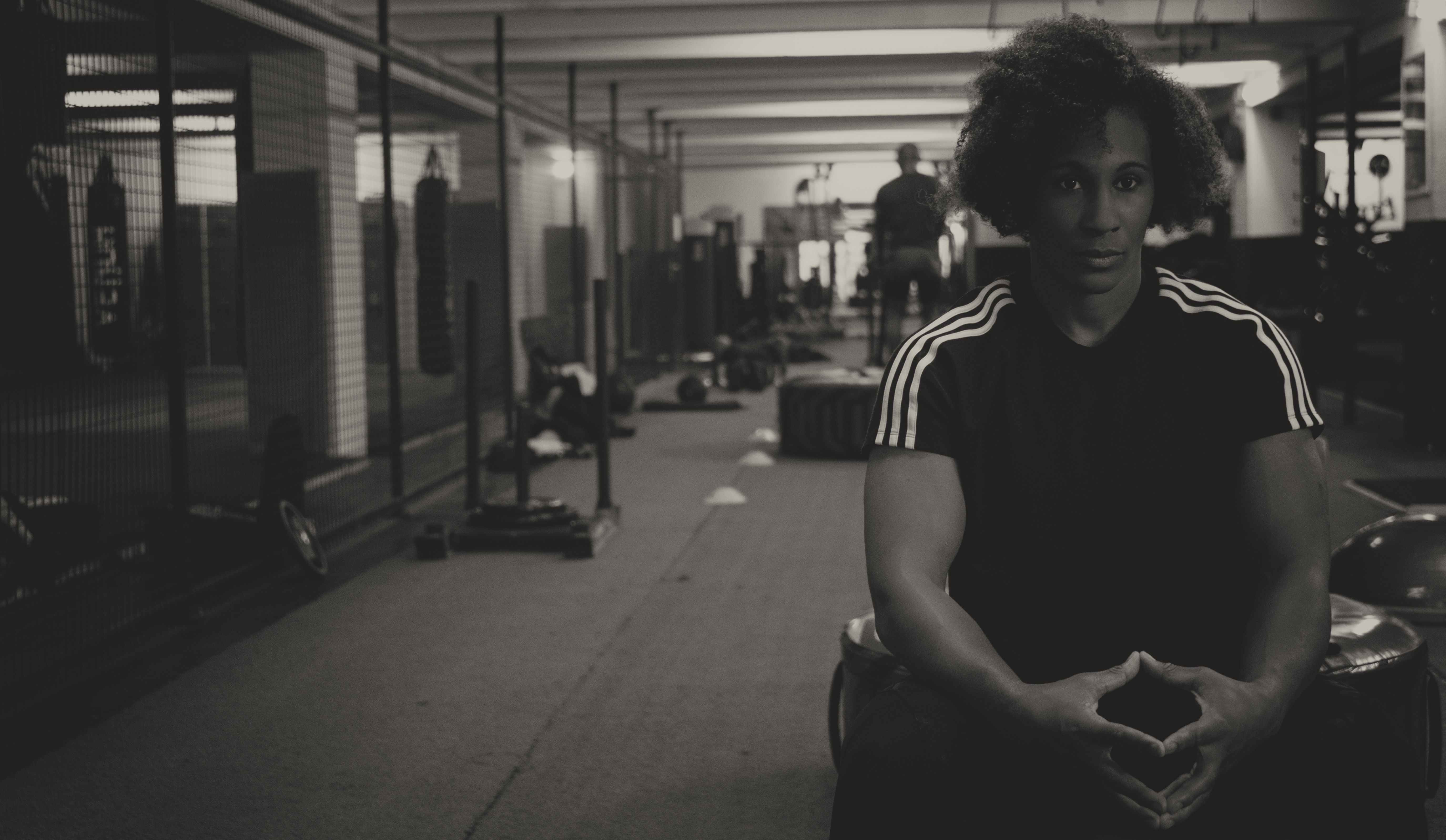 Asma Niang prise lors d'un shooting photo avec la photographe Nathalie Guilleminot Pernet. -2019